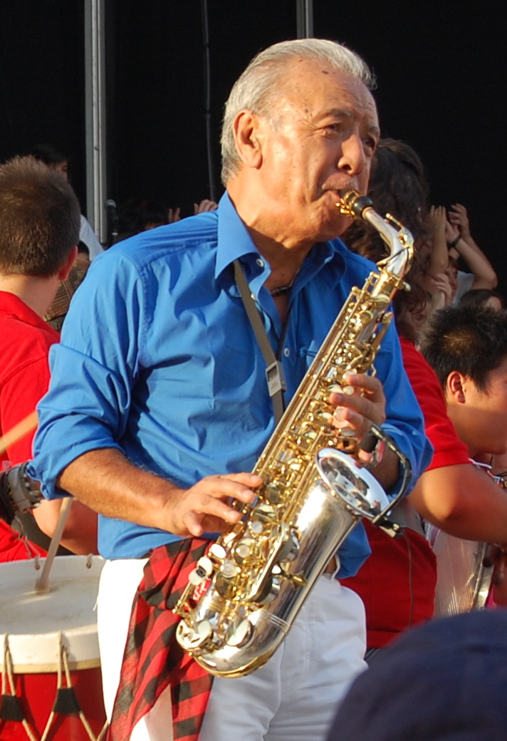 Japanese jazz musician Sadao Watanabe at Expo Zaragoza 2008